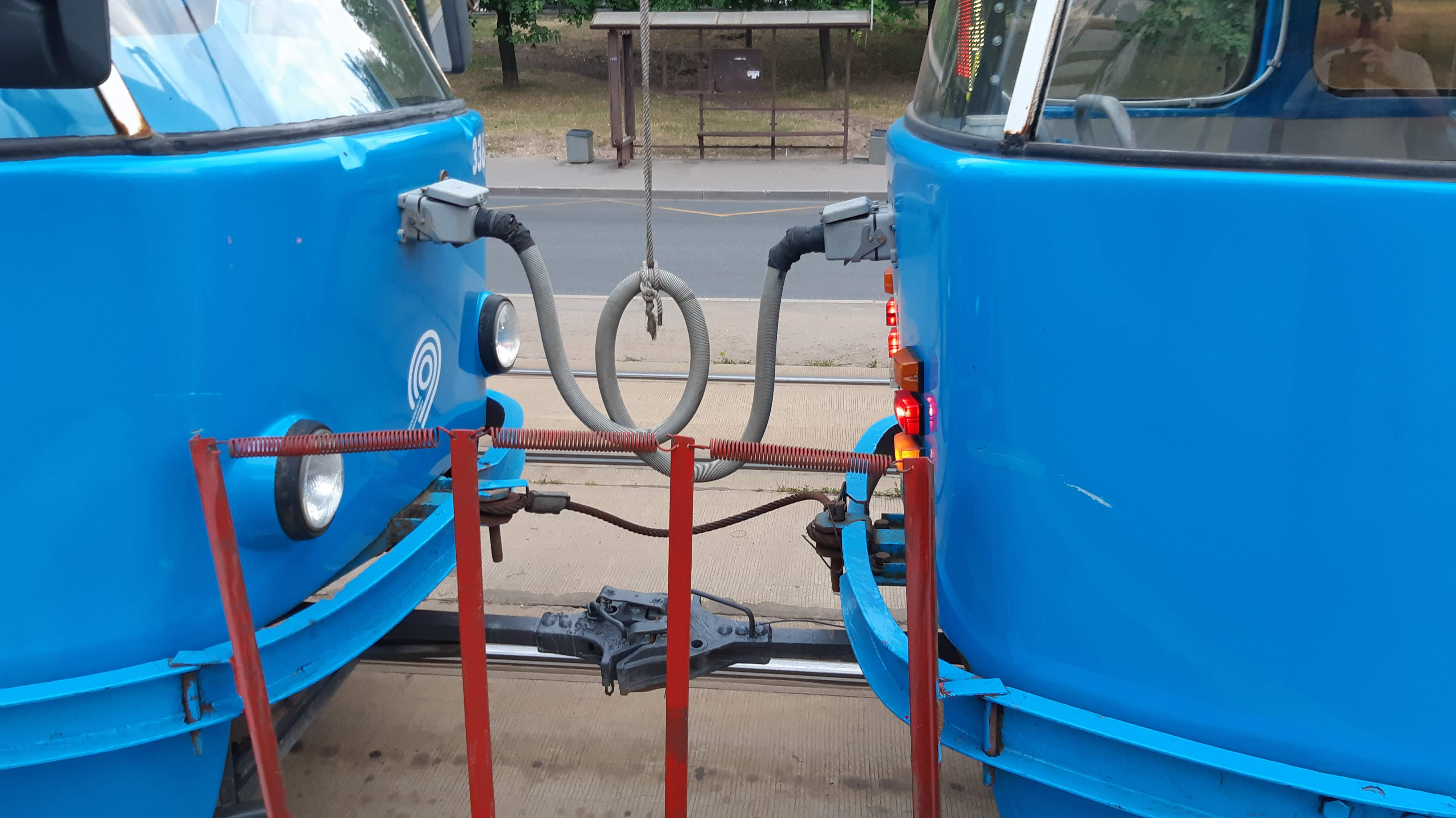 Кабель (жокс) межвагонного соединения трамваев Т3